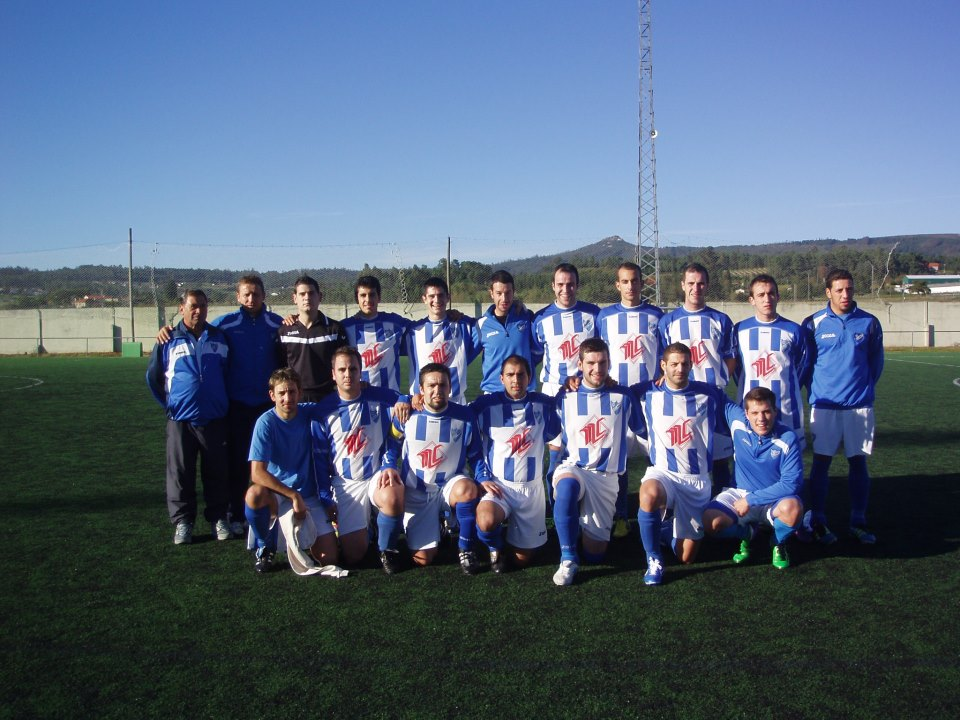 San Mamede Tempada 2012